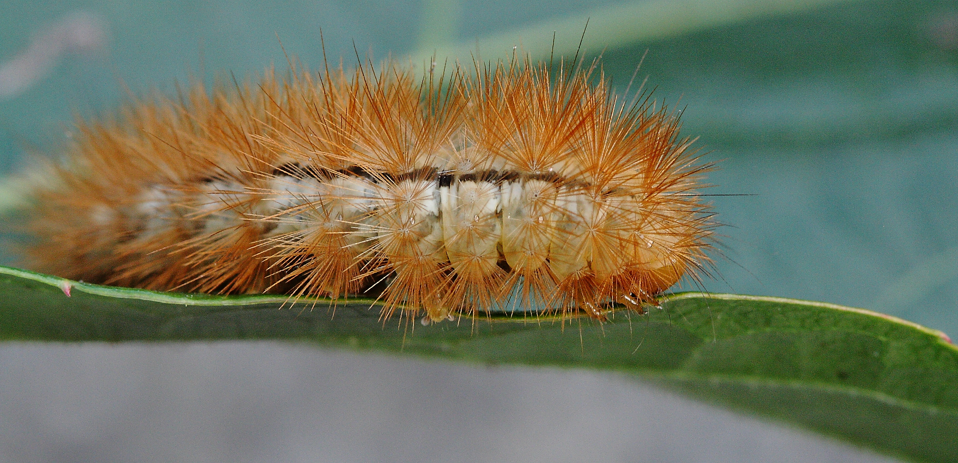 Sachsen, vertrocknete Blätter des Wilden Weines: Raupe der Gelben_Tigermotte_(Spilosoma_lutea)